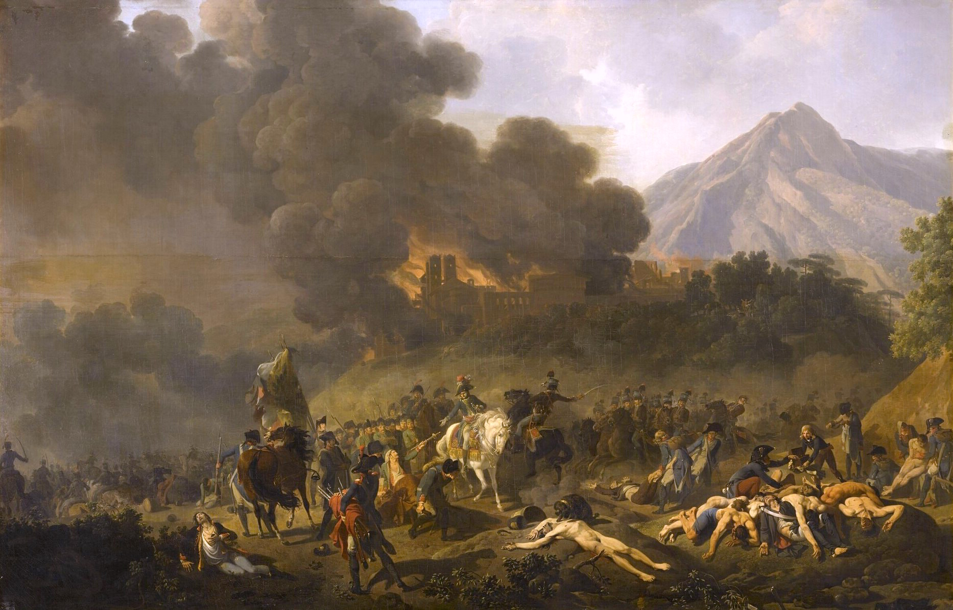 Bonaparte reçoit les prisonniers sur le champ de bataille, 1797. Prisonniers autrichiens ? Pas de lieu précis. Paysage d'Italie du Nord ou du Tyrol. Campagne d'Italie (1796-1797). Dimensions : cadre: 181 x 271 x 10 cm ; œuvre : 164 x 255 cm. Matière et technique : huile sur toile.